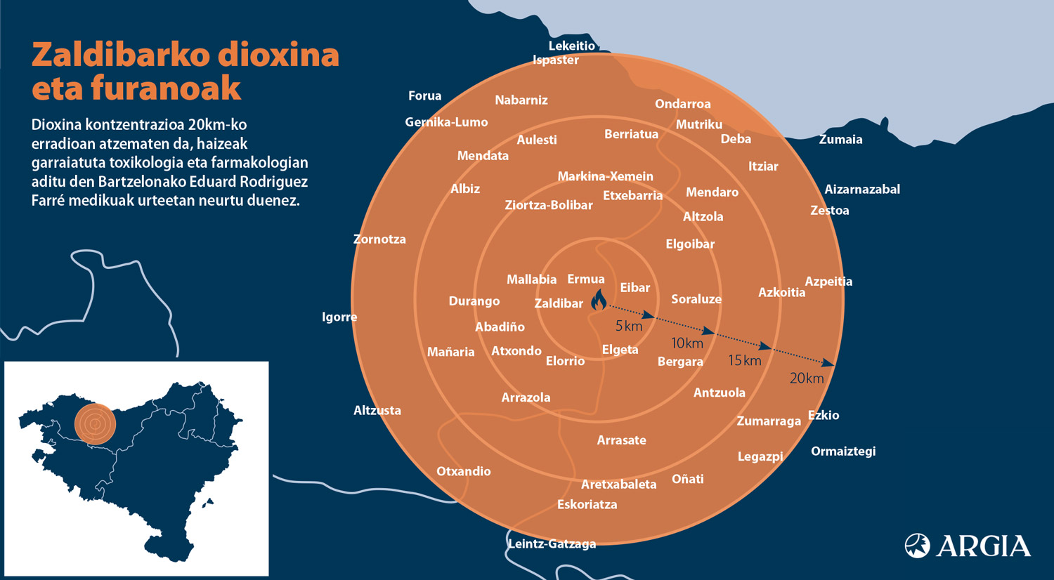 Zaldibarko zabortegiko hondamendiak askatutako dioxinaren eragin eremua, 20 kilometroko erradioan